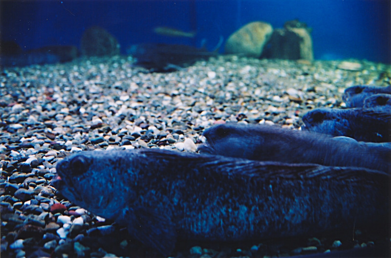 Loups atlantique au Parc Aquarium du Québec (ville de Québec, Québec, Canada); Atlantic wolfish at the Parc Aquarium du Québec (Quebec city, Quebec, Canada)